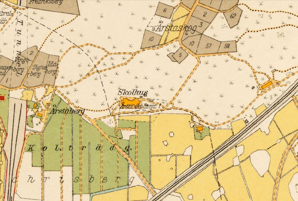 Årsta skolhus på en karta från 1928